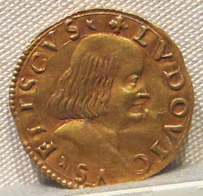 Palazzo Massimo alle Terme